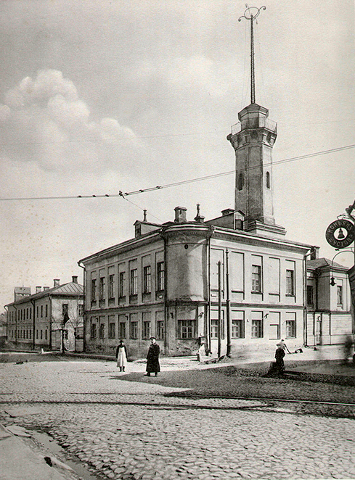 204.МЪщанскiй полицейскiй домъ на 3-й МЪщанской ул. (Москва)